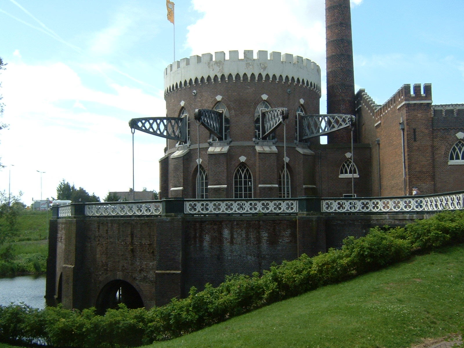 Pumpwerk De Cruquius